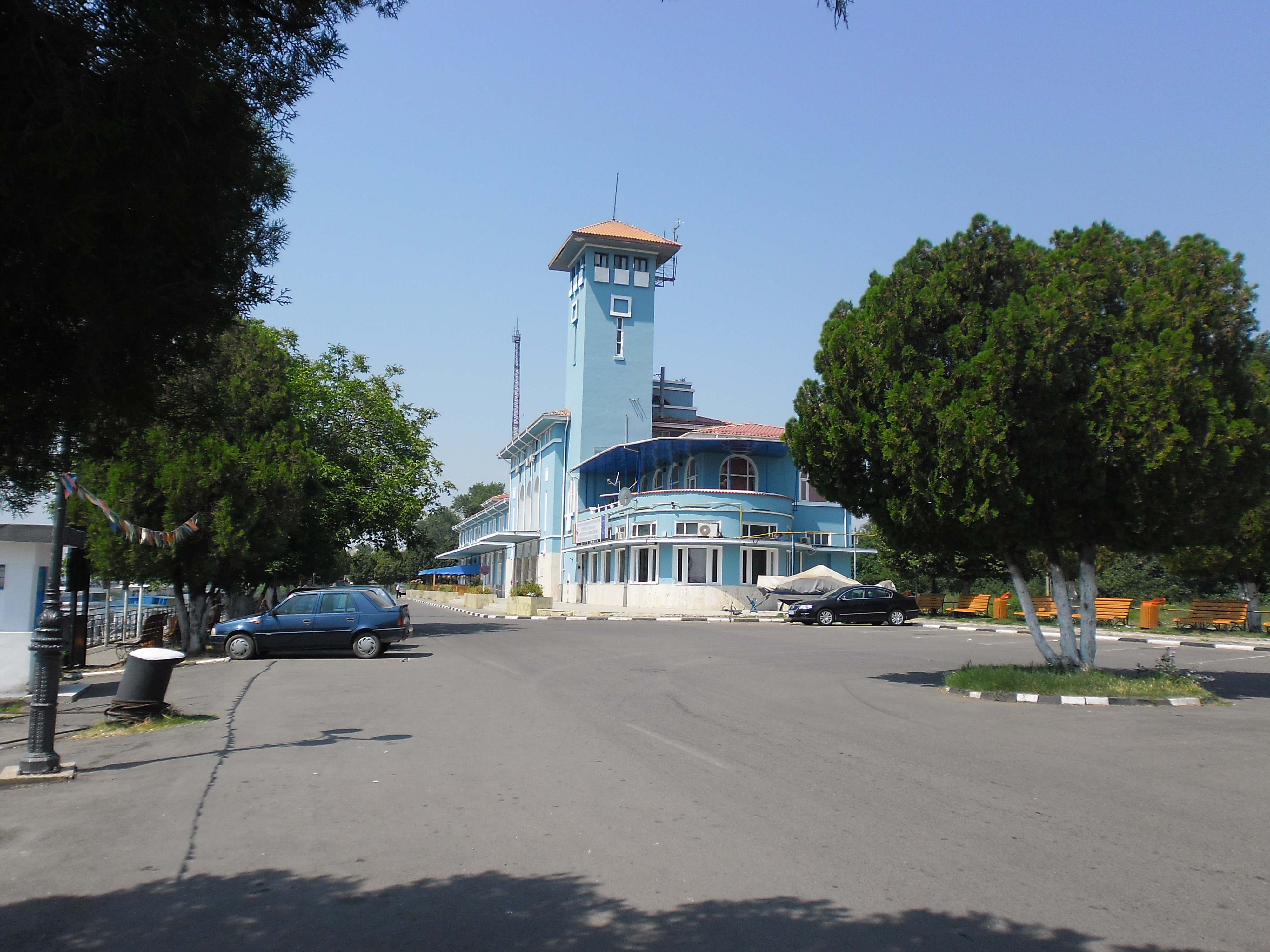 Căpitănia Portului Giurgiu